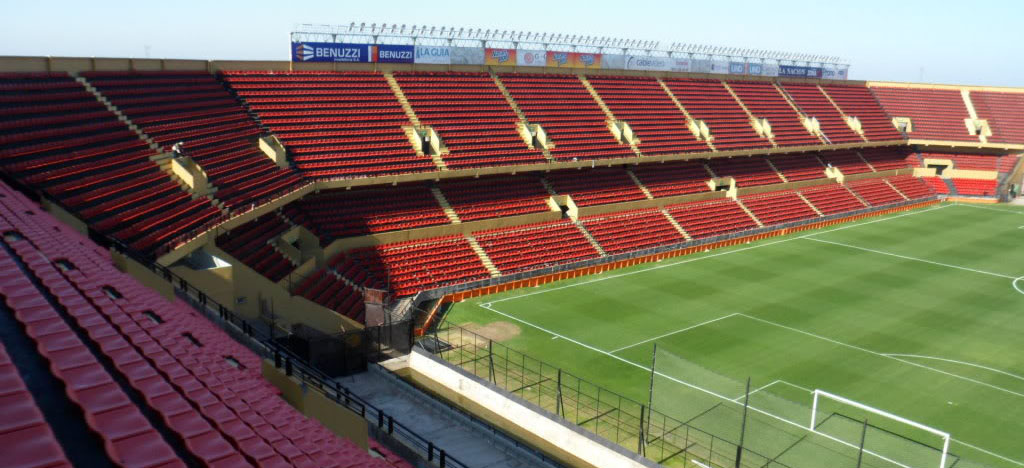 Foto tomada desde la platea norte.